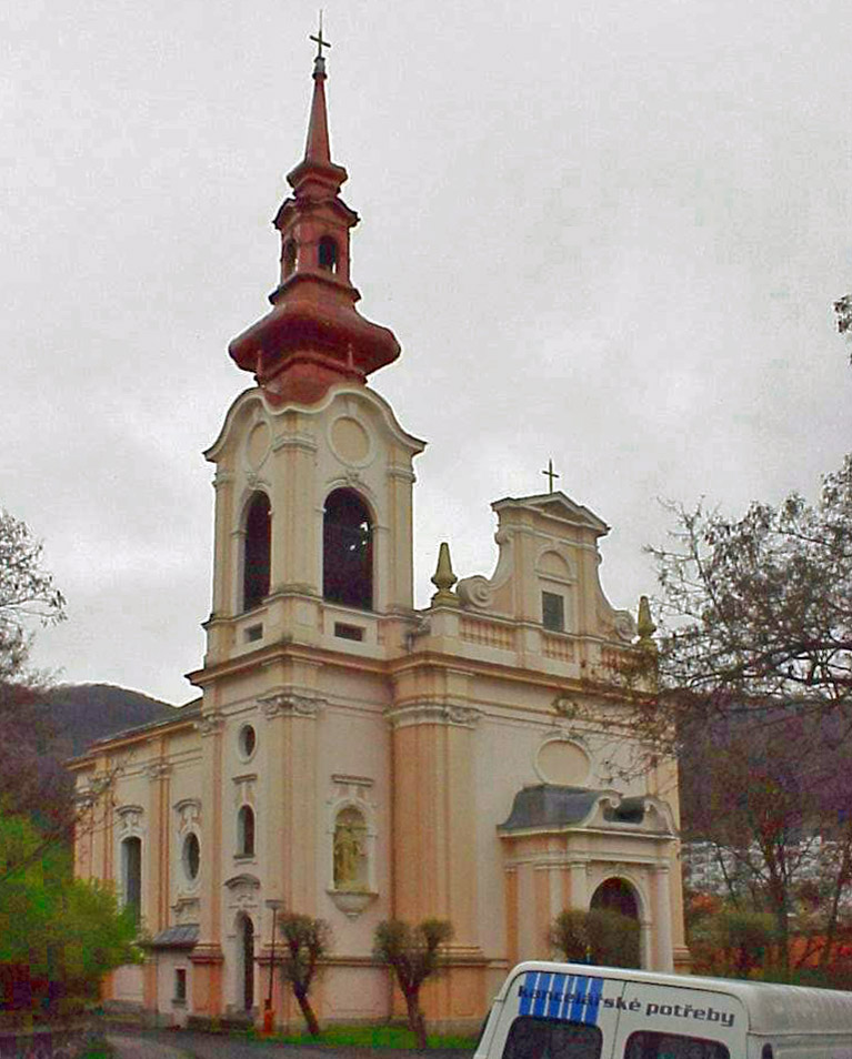 church in Střekov